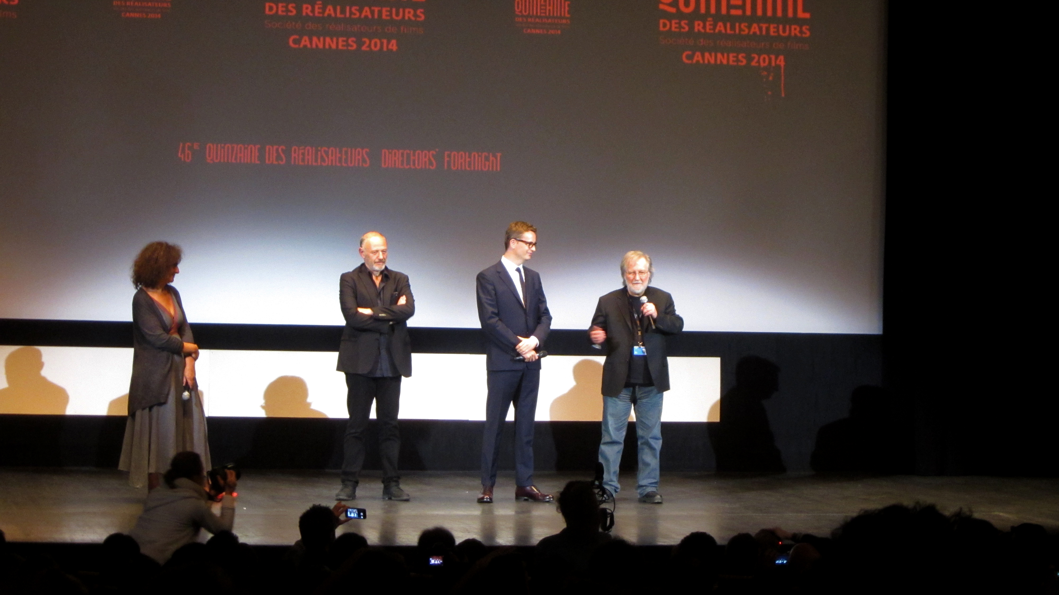 Édouard Waintrop, Nicolas Winding Refn et Tobe Hooper lors de la projection de Massacre à la tronçonneuse (version restaurée) à la Quinzaine des réalisateurs du Festival de Cannes 2014.